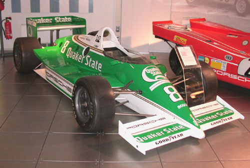 Porsche CART/Indy Rennwagen 1989, Porsche-Museum, Stuttgart